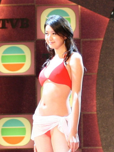 Suki Chui